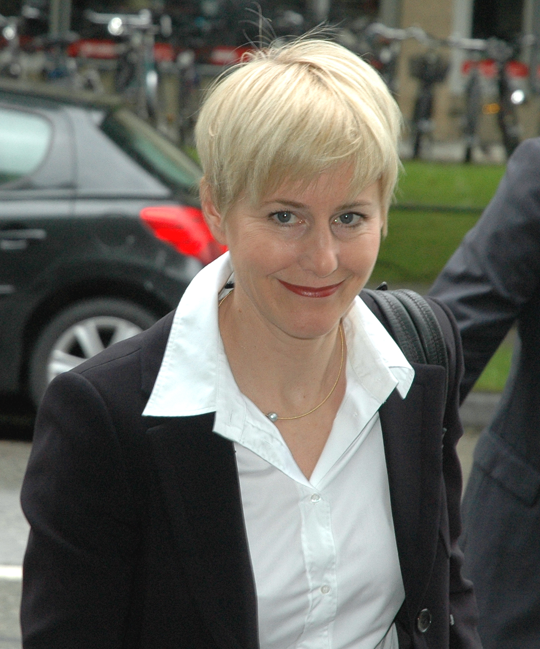 Anja Sturm (Verteidigerin von Beate Zschäpe ) vor dem Oberlandesgericht München